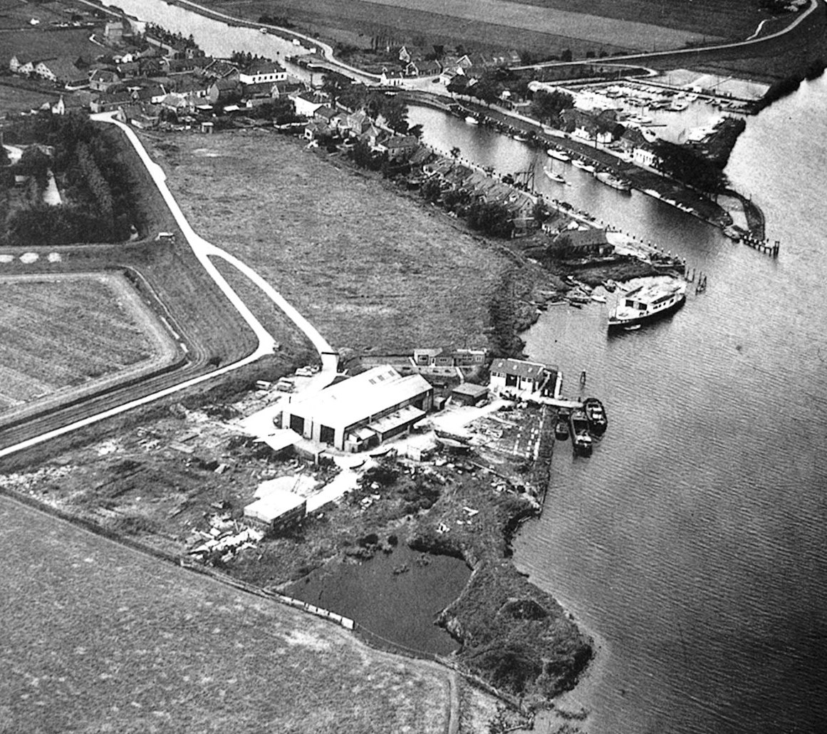 Nieuwesluis gezien vanuit de lucht in de jaren 60